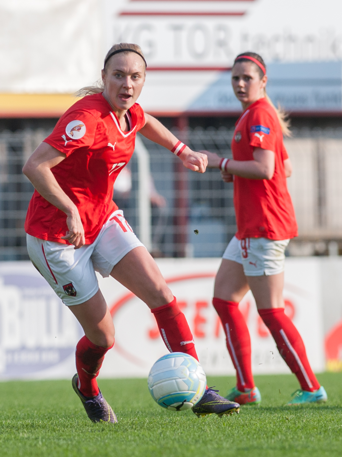 Steyr, Austria, 10.04.2016, ÖFB Frauen EM-Qualifikation - Österreich vs Norwegen. Bild zeigt Sarah Puntigam (AUT) und Sarah Zadrazil (AUT).